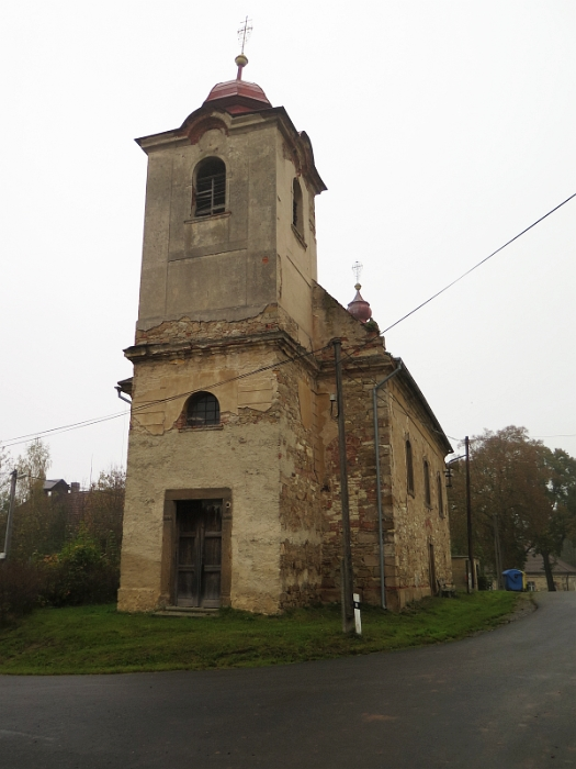 Kostel Všech svatých, náves, Veclov (Svojetín).